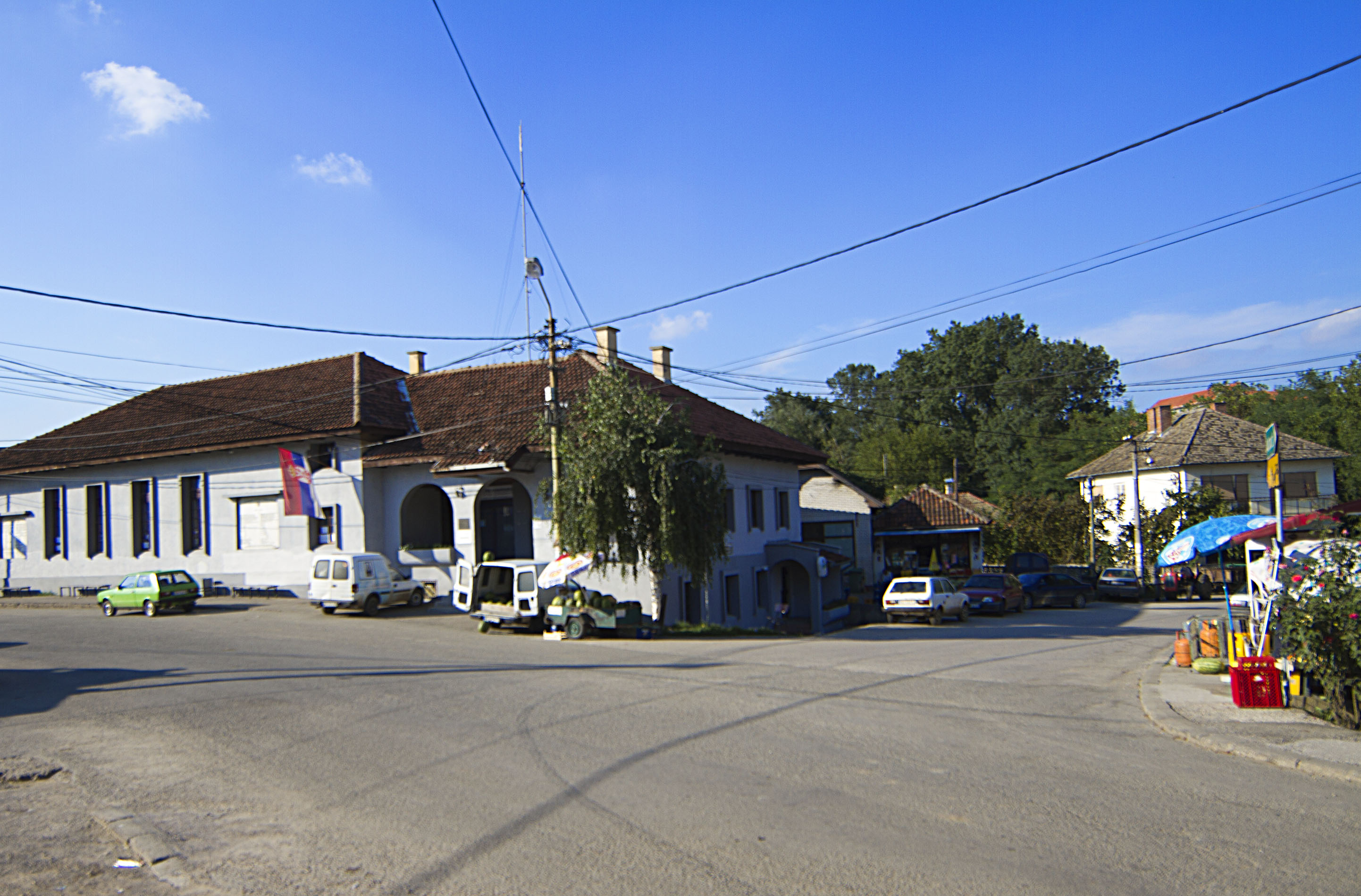 Умчари, центар